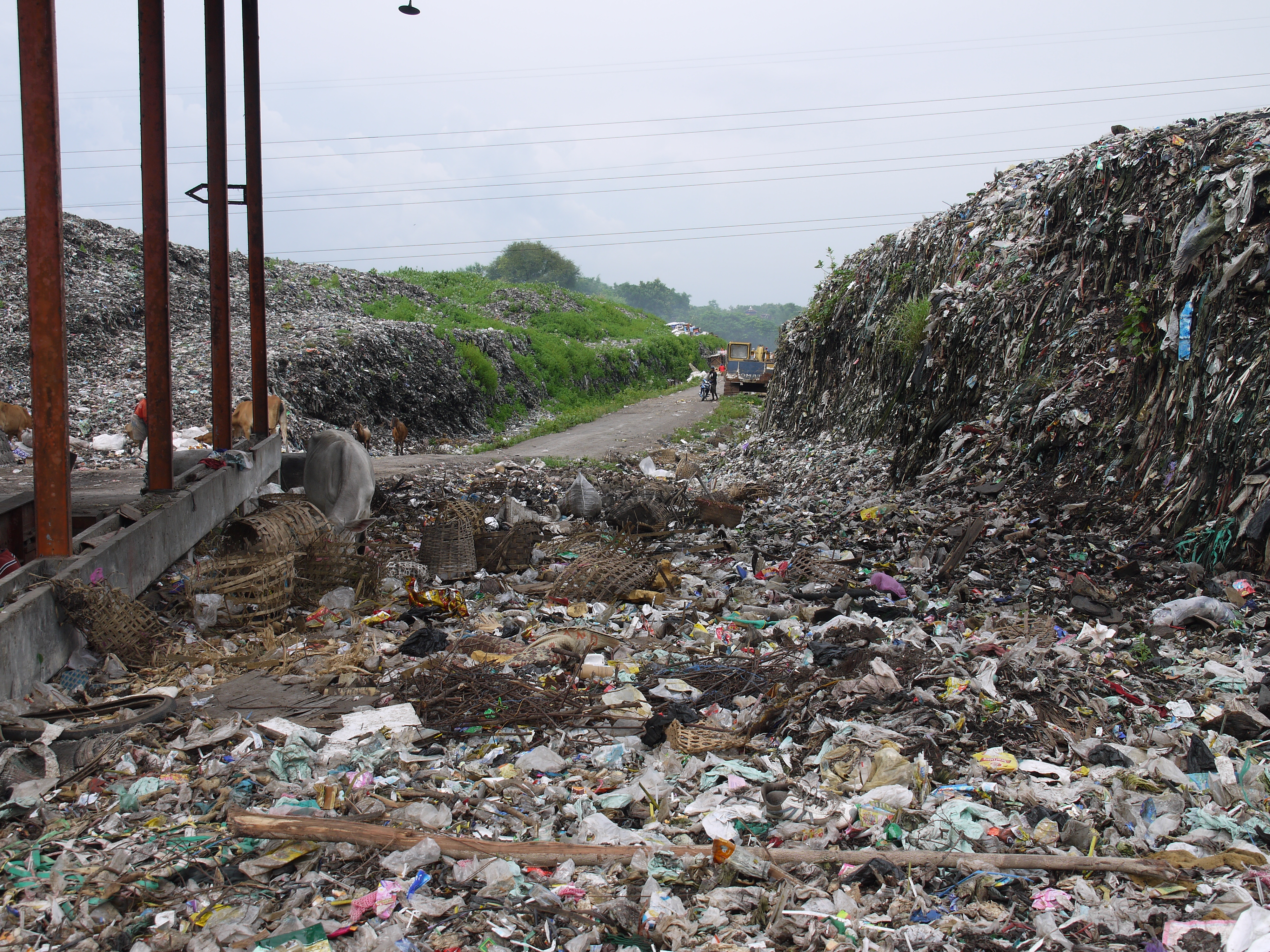 TPA Putri Cempo, Mojosongo